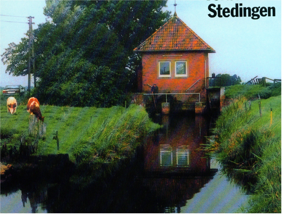 Schöppwark in Stedingen, Titelbild vun dat Book „Geschichte des Entwässerungsverbandes Stedingen“ vun Gerold Meiners